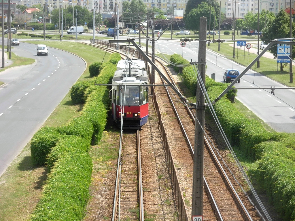 Tramwaj na alei Wojska Polskiego w Bydgoszczy